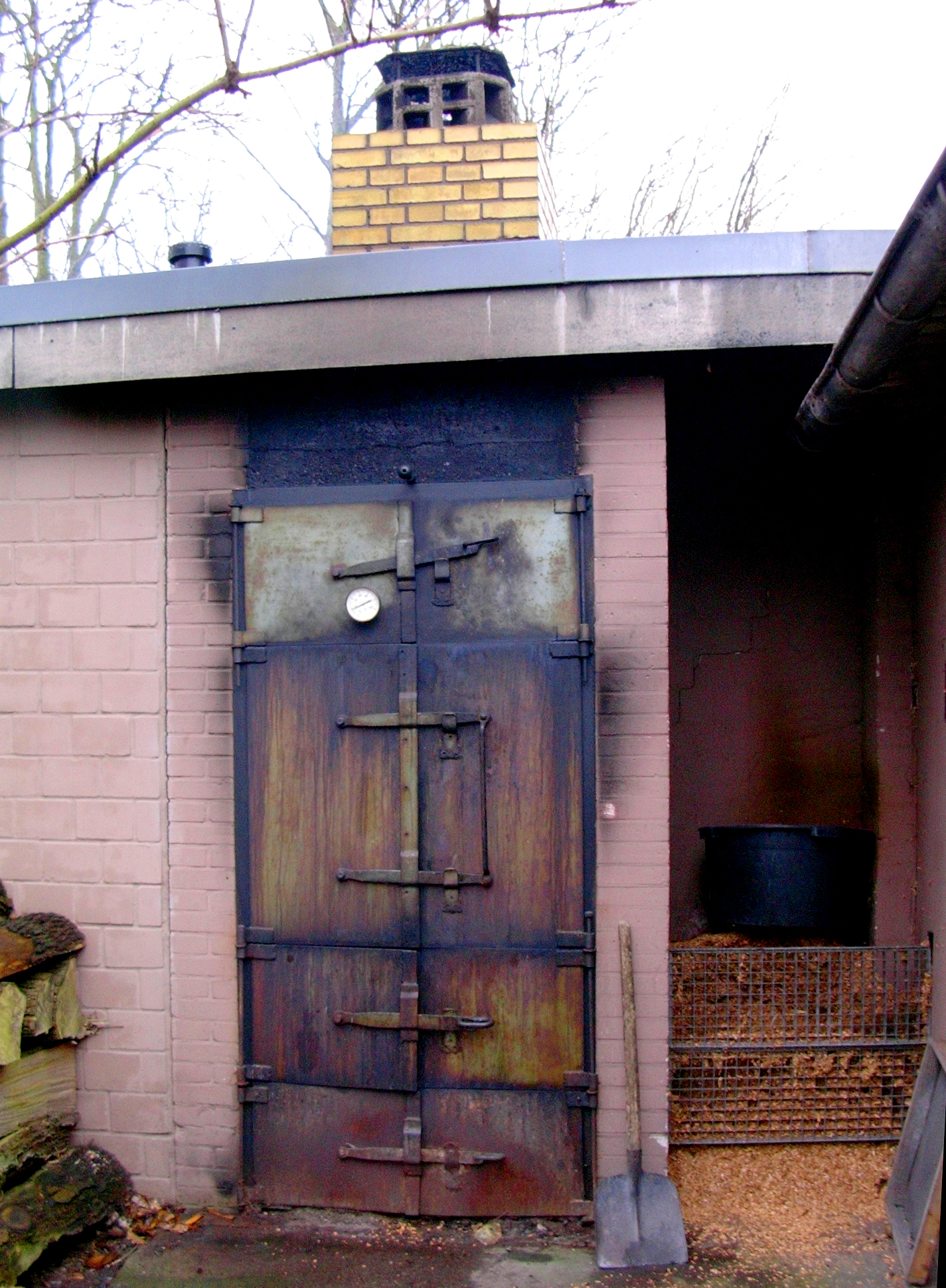 Ein typischer Altoner Ofen aus den 60er Jahren in Eckernförde